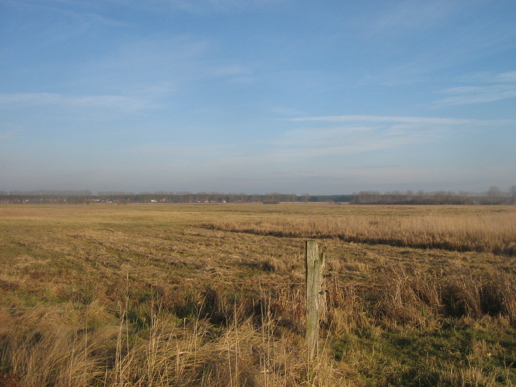 Das Kremmener Luch in der Nähe der Horstberge